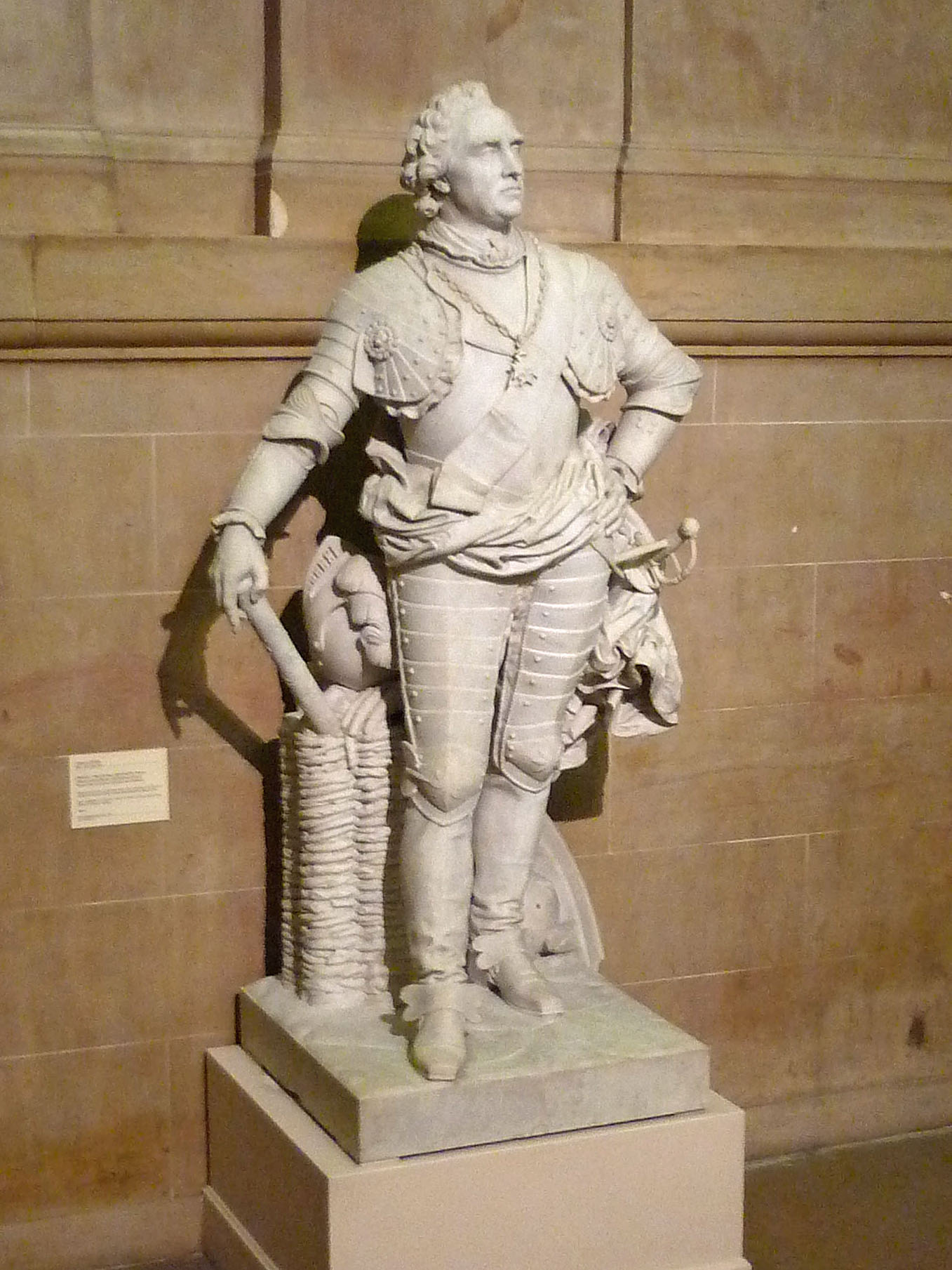 Moritz von Sachsen, Marschall de Saxe im Kunstmuseum Dijon